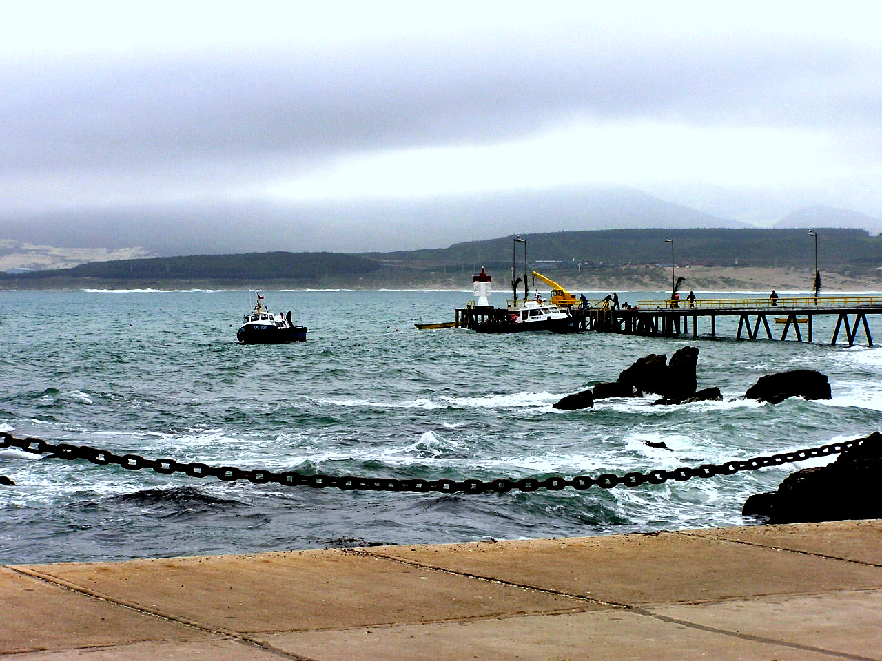 LOs Vilos